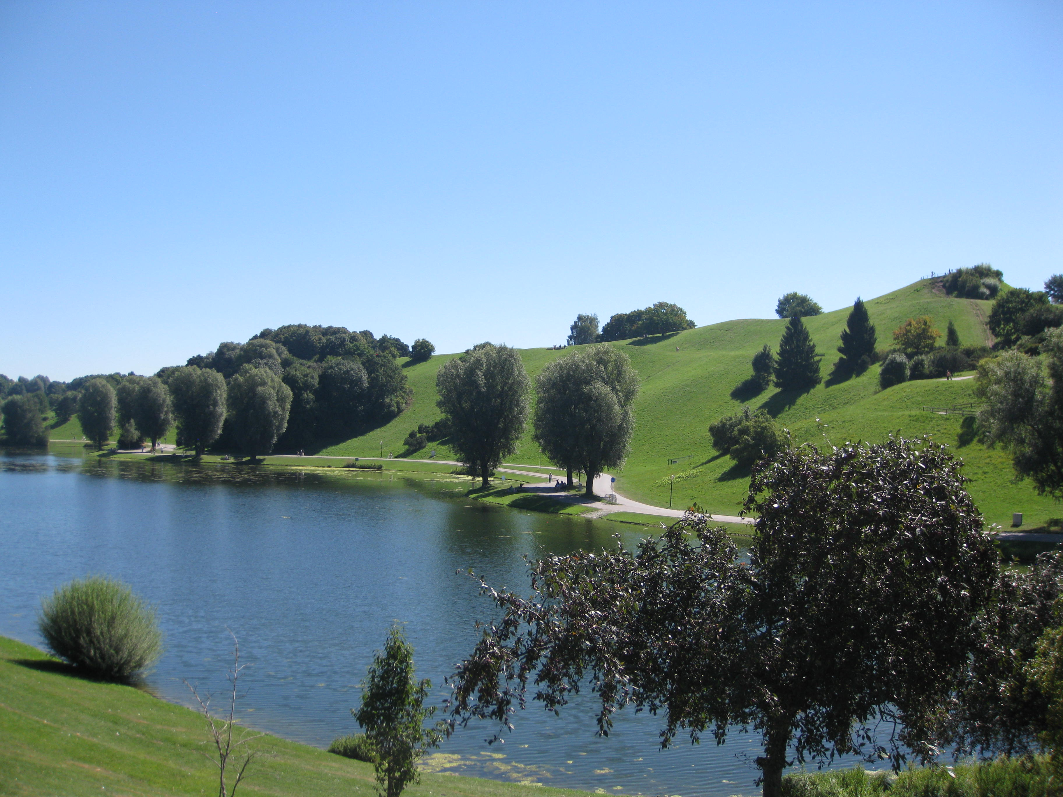 Milbertshofen-Am Hart, Munich, Germany